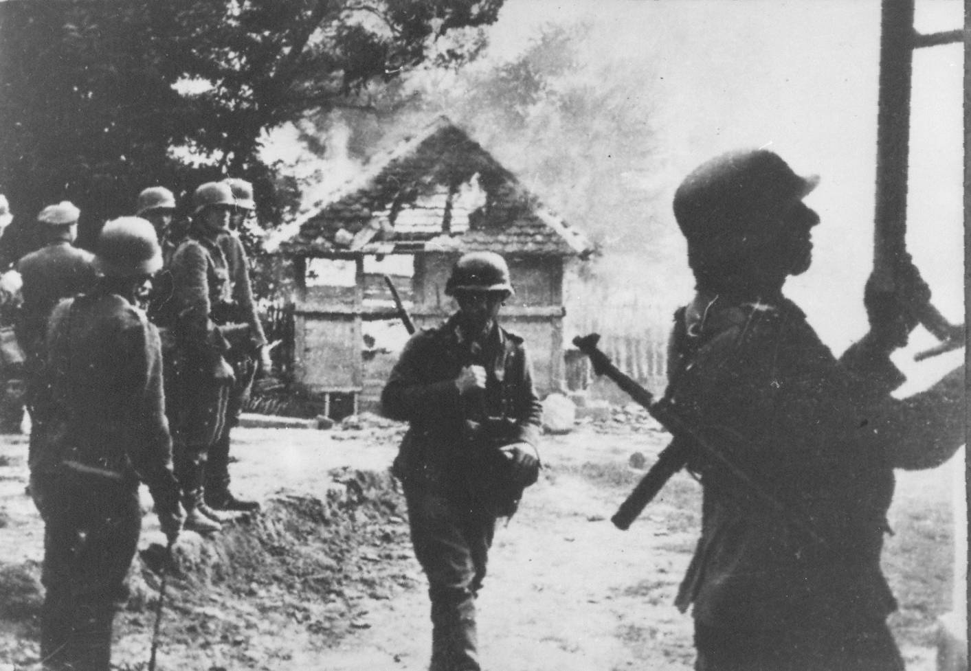 Truppe tedesche della 342. divisione fanteria impegnate nella prima offensiva anti-partigiana in Serbia nell'autunno 1941